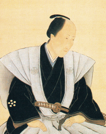 菊池教中は江戸時代の豪商・勤王家